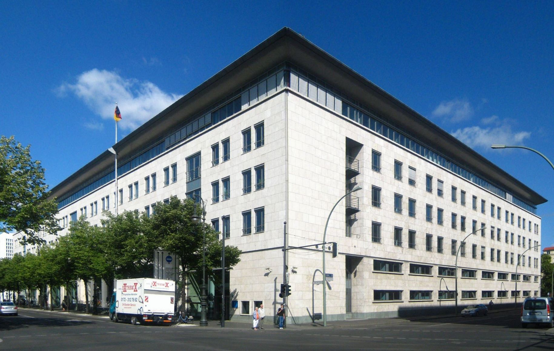 Das ehemalige Ministerium für Außenhandel und Innerdeutschen Handel der DDR, heute Otto-Wels-Haus (Bürogebäude des Deutschen Bundestags), Unter den Linden 48/56 in Berlin-Mitte. Das Gebäude nimmt den gesamten Block zwischen Unter den Linden, Neustädtischer Kirchstraße, Mittelstraße und Schadowstraße ein. Es wurde 1963-1965 nach Entwürfen der Architekten Emil Leibold, Herbert Boos und Hanno Walther errichtet und 1993-1995 von den Architekten Brands, Kolbe & Wernik umgebaut sowie um ein Geschoss aufgestockt; dabei blieb vom ursprünglichen Bau nur das Stahlskelett erhalten. Neben Büros von Abgeordneten des Deutschen Bundestags besitzt das Haus Ladengeschäfte am Boulevard Unter den Linden. Als Teil des Bauensembles Dorotheenstadt ist das Gebäude denkmalgeschützt.